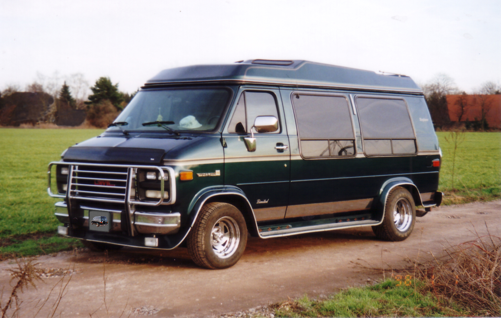 Vandura